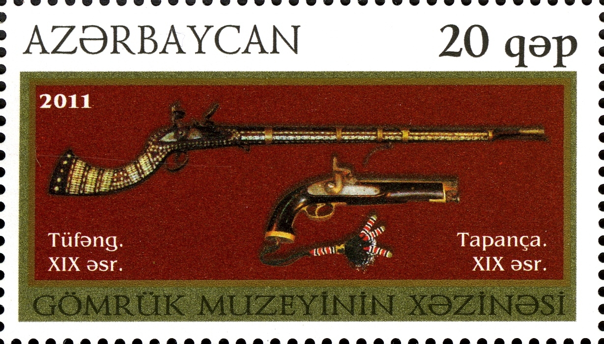 Gömrük Muzeyinin xəzinəsi